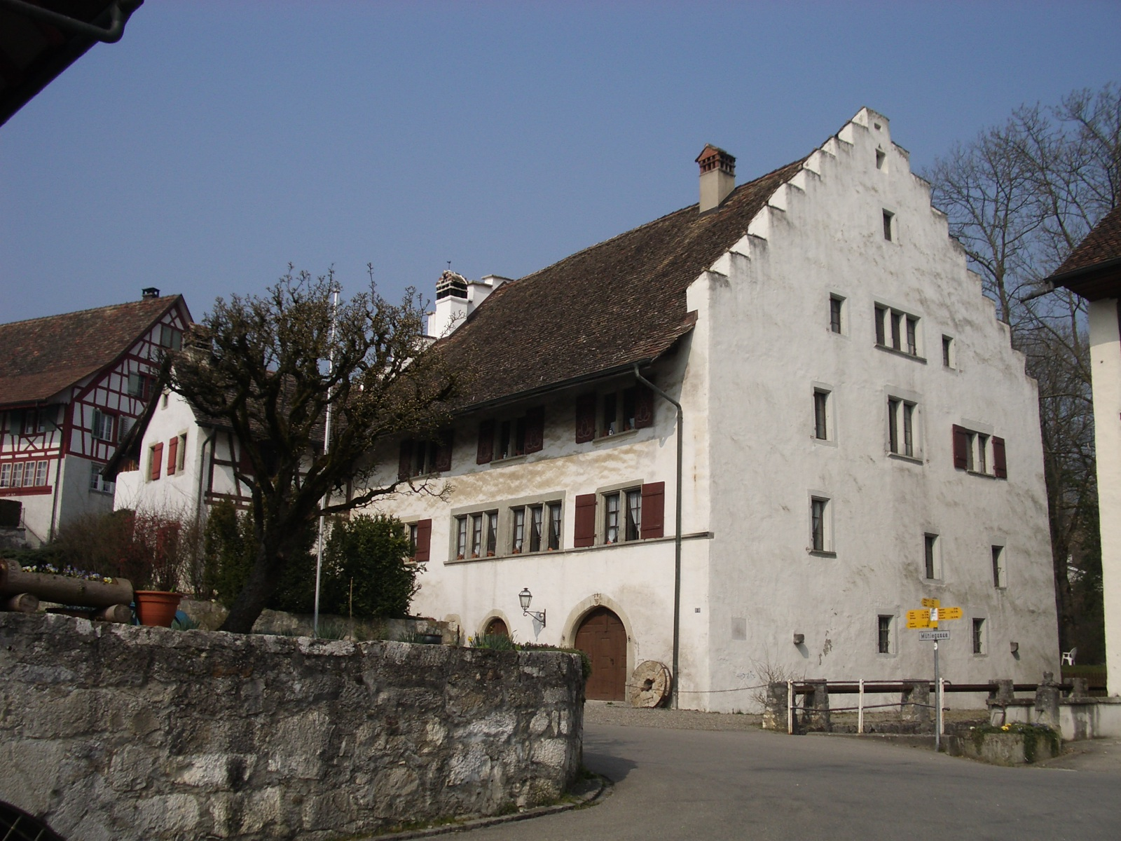 Otelfingen ZH, Switzerland self-made, March 2007